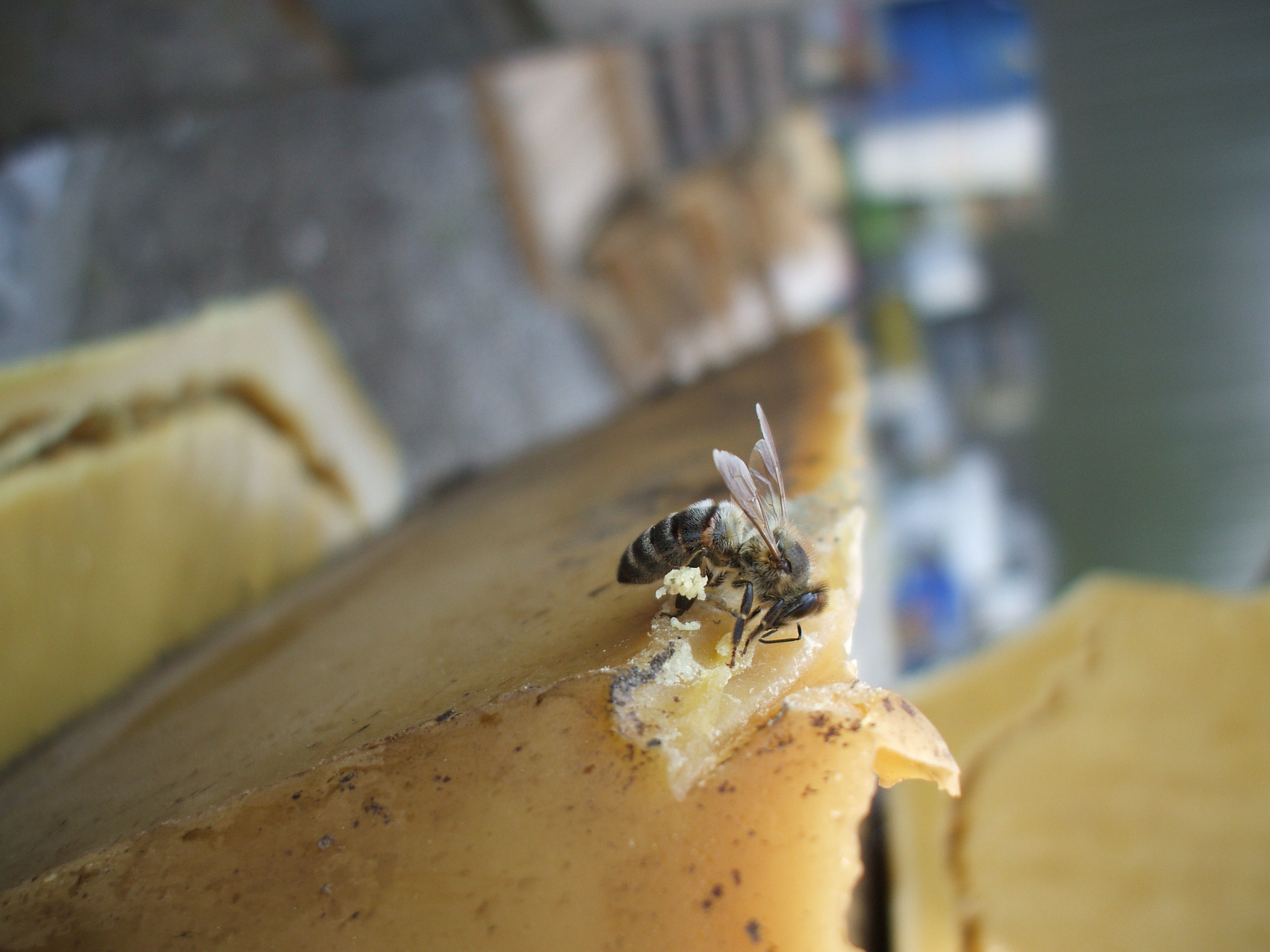 cire.